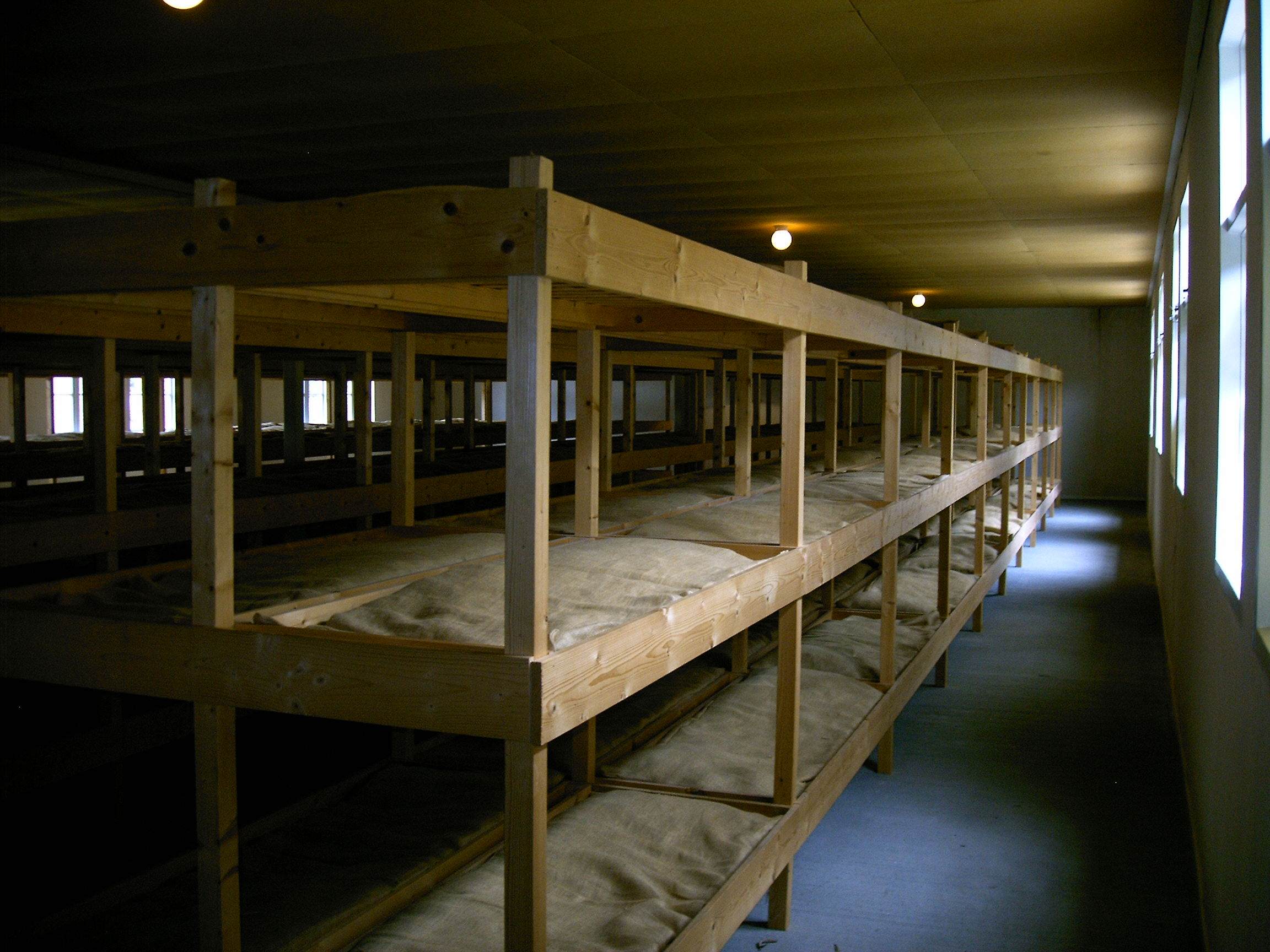 Nationaal monument kamp Vught, Bedden in barak (200 stuks per slaapvertrek)